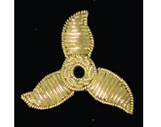 Distintivo del Cuerpo de Máquinas de la Armada Española